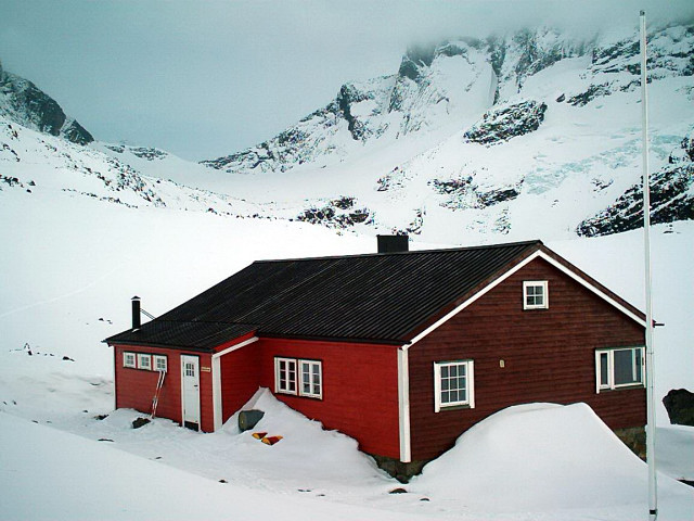 Skagadalshytta med Dyrehaugstindene i bakgrunnen.